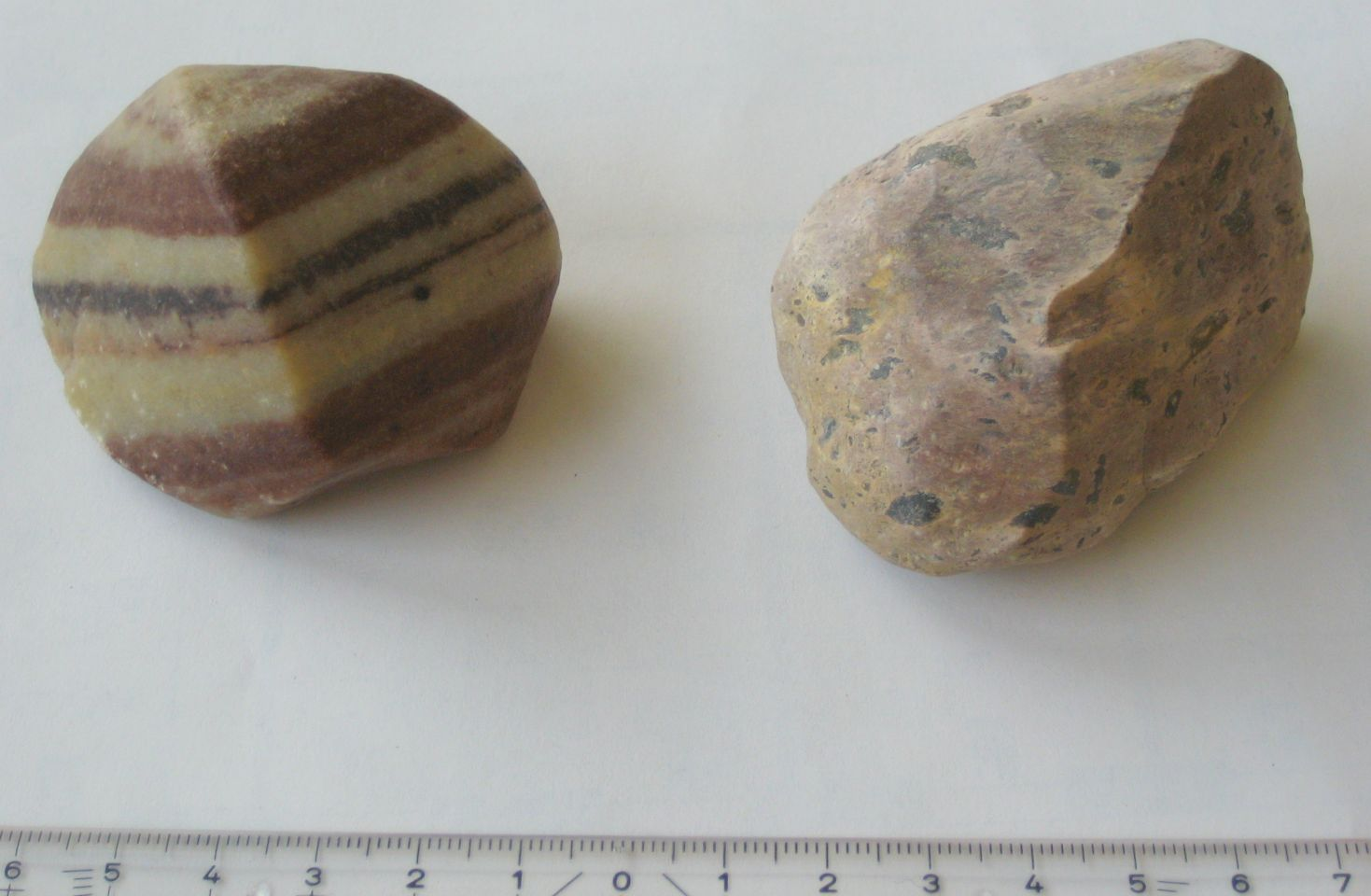 Windgeschliffene Geschiebe (Windkanter) aus Brandenburg, gefunden im Landkreis Dahme-Spreewald